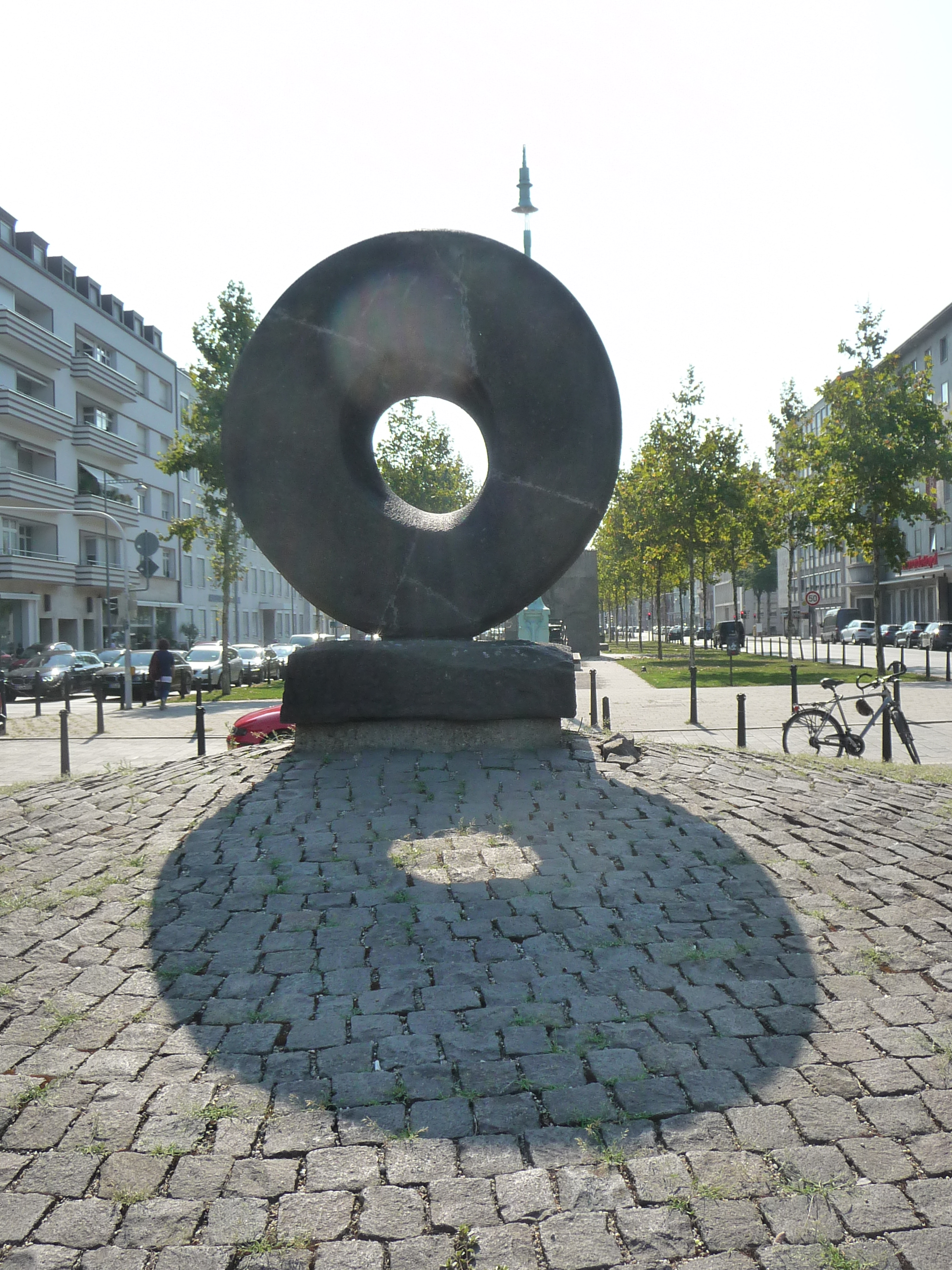 Fünfzehn Jahre lang meditierte der Bildhauer Morice Lipsi. Dann hatte er die Idee des Lipsi-Rads, das er als selbst als Höhepunkt seines Schaffens betrachtete. Die Stadt Mannheim kaufte das Rad 1964 aus Lipsis Ausstellung in der Kunsthalle für 60.000 DM. 1965 wurde es an der Carl-Diehm-Halle aufgestellt und bekam den Spitznamen “Mühlrad”. Vier Jahre später fuhr es in Lastwagenfahrer um. Seitdem hat das Rad Bruchstellen. Nach der Reparatur wurde das Rad an der Kunsthalle aufgestellt. 1975 bekam es seinen heutigen Platz.